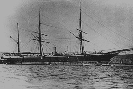 Corbeta chilena Super Alabama "Abtao". Epoca de la Guerra del Pacífico (1879-1884)